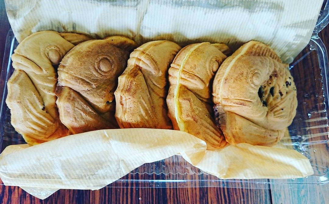 対馬市峰町佐賀で製造・販売されていたたい焼き。丸い形が特徴で、対馬の名物となっていた。2020年（令和2年）6月末で製造・販売を行っていた永留菓子店が閉店した。「（対馬）まん中のたい焼き」とも呼ばれていた。